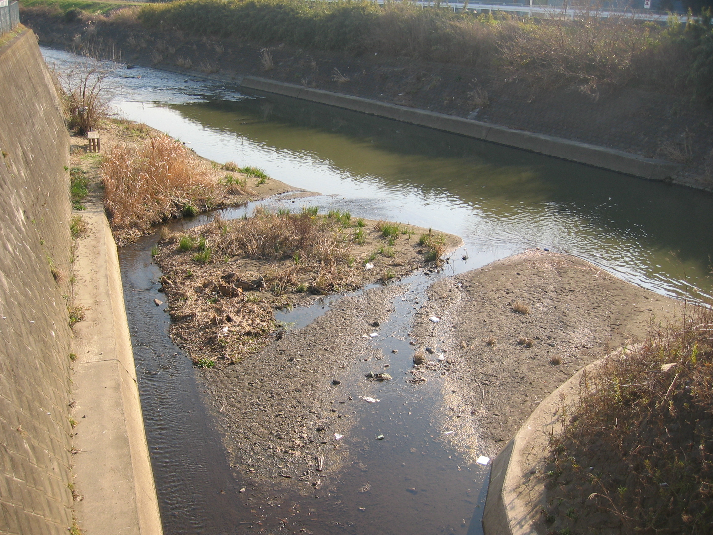 2004年12月27日、利用者自身の撮影。